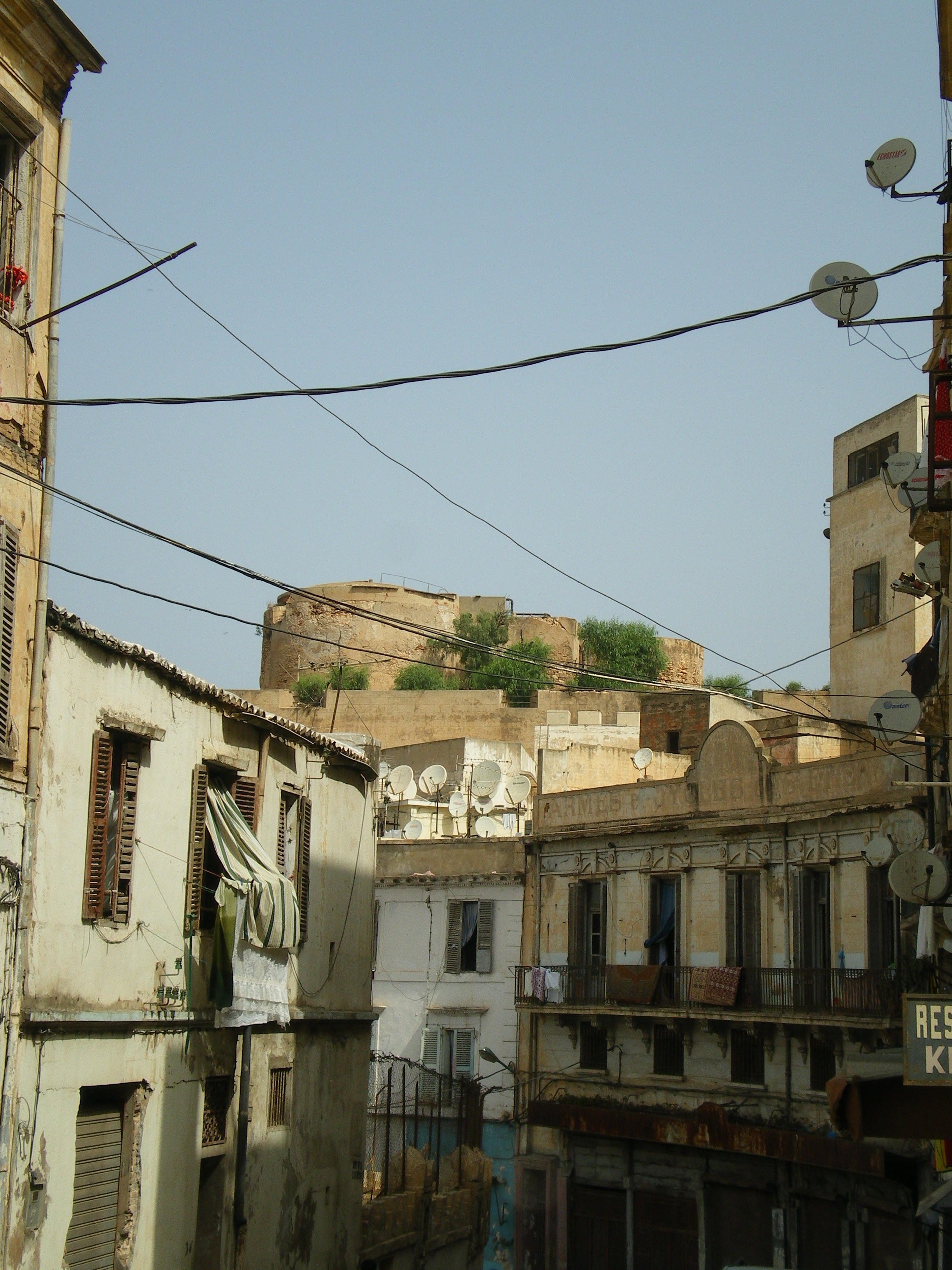 Ruelle et donjon du Rozalcazar, Oran